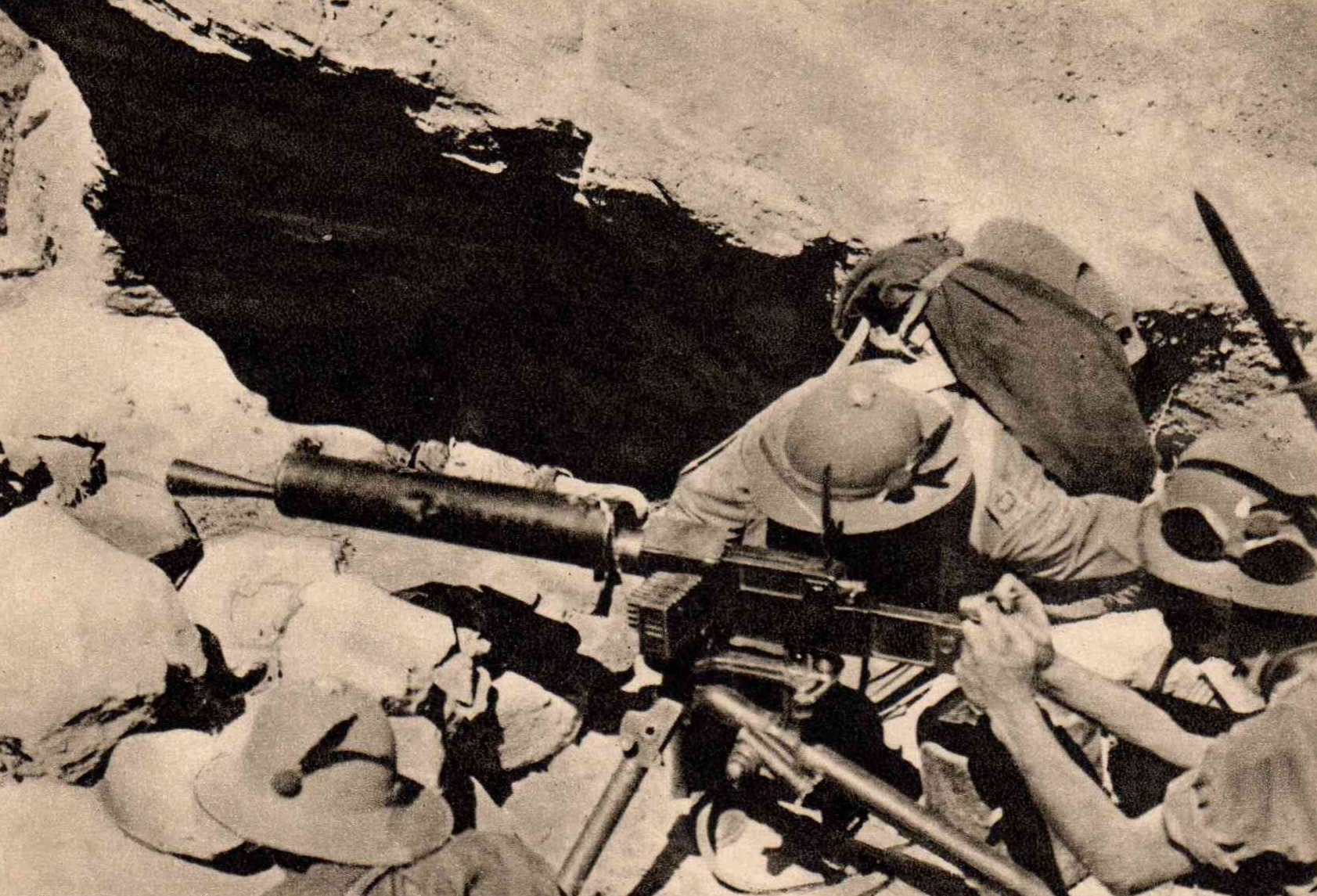 Serie:Visioni della conquista dell’Impero – mitraglieri Alpini sull'Amba Aradam